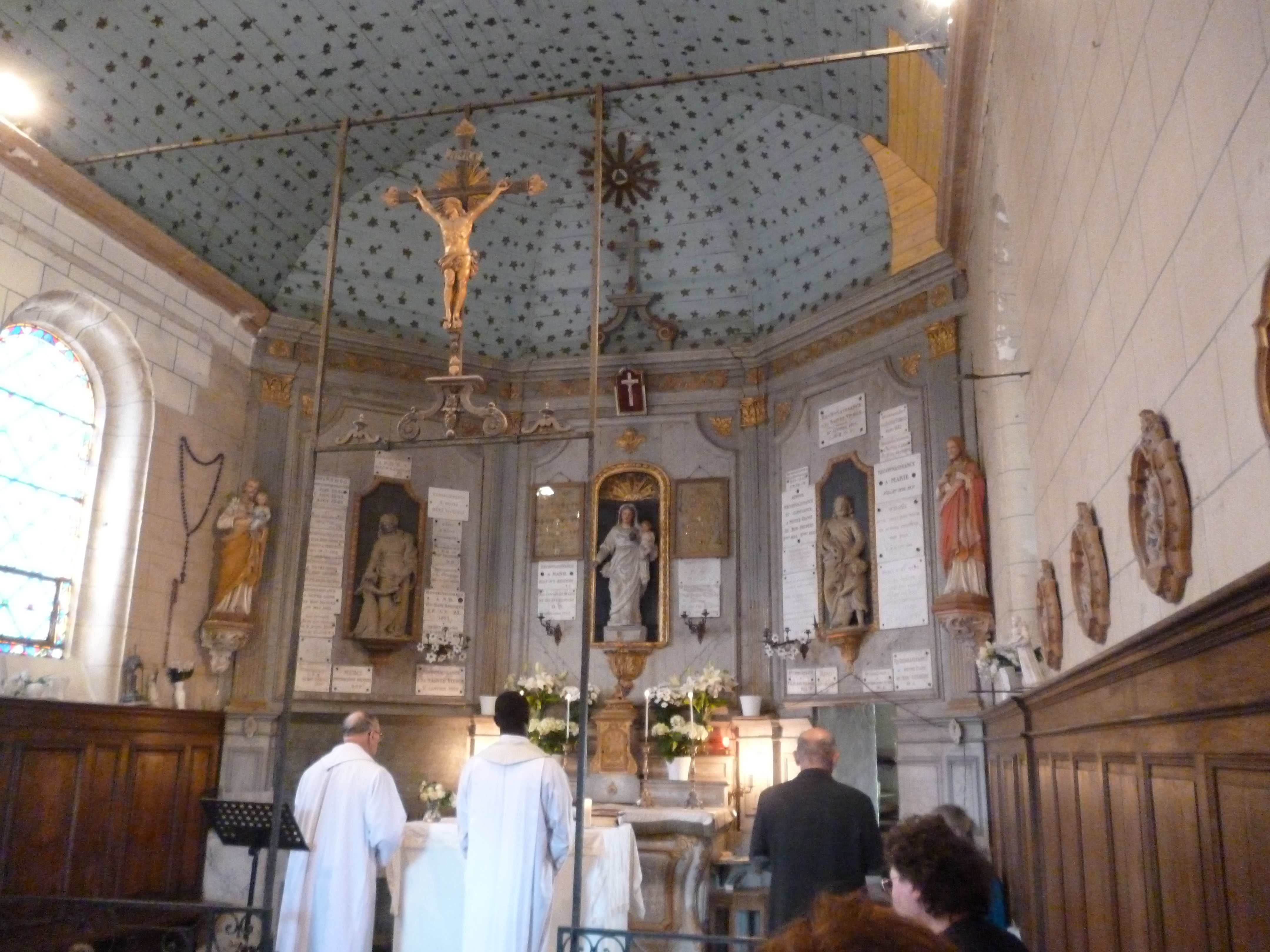 L'intérieur de la Chapelle Notre-Dame-du-Bon-Secours, située sur la commune de Gannes (Oise), pendant la Neuvaine, le 14 juillet 2016.